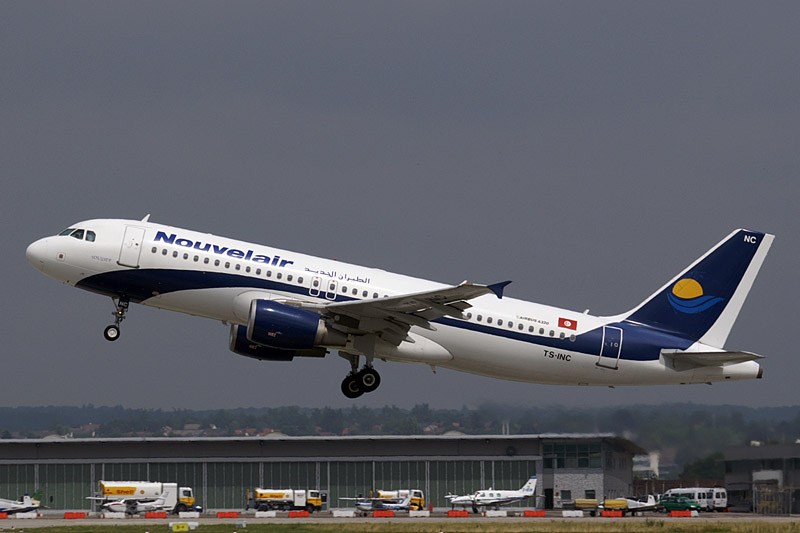 Nouvelair Airbus A320-200 TS-INC